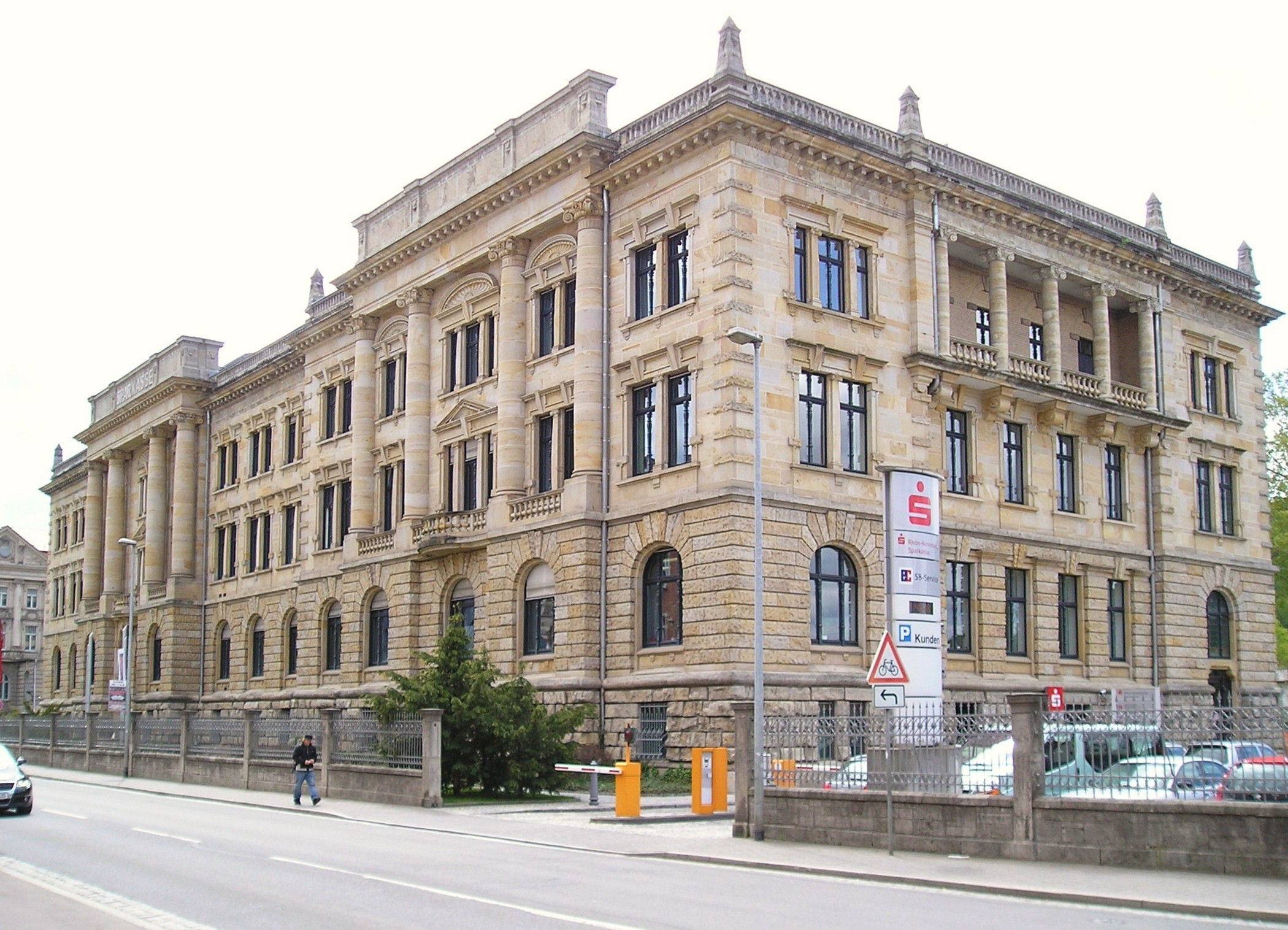 Gebäude der Deutschen Hypothekenbank Meiningen, heute Sparkasse